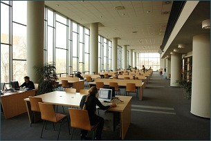 A József Attila Tanulmányi és Információs Központ olvasóterme (SZTE, Szeged)